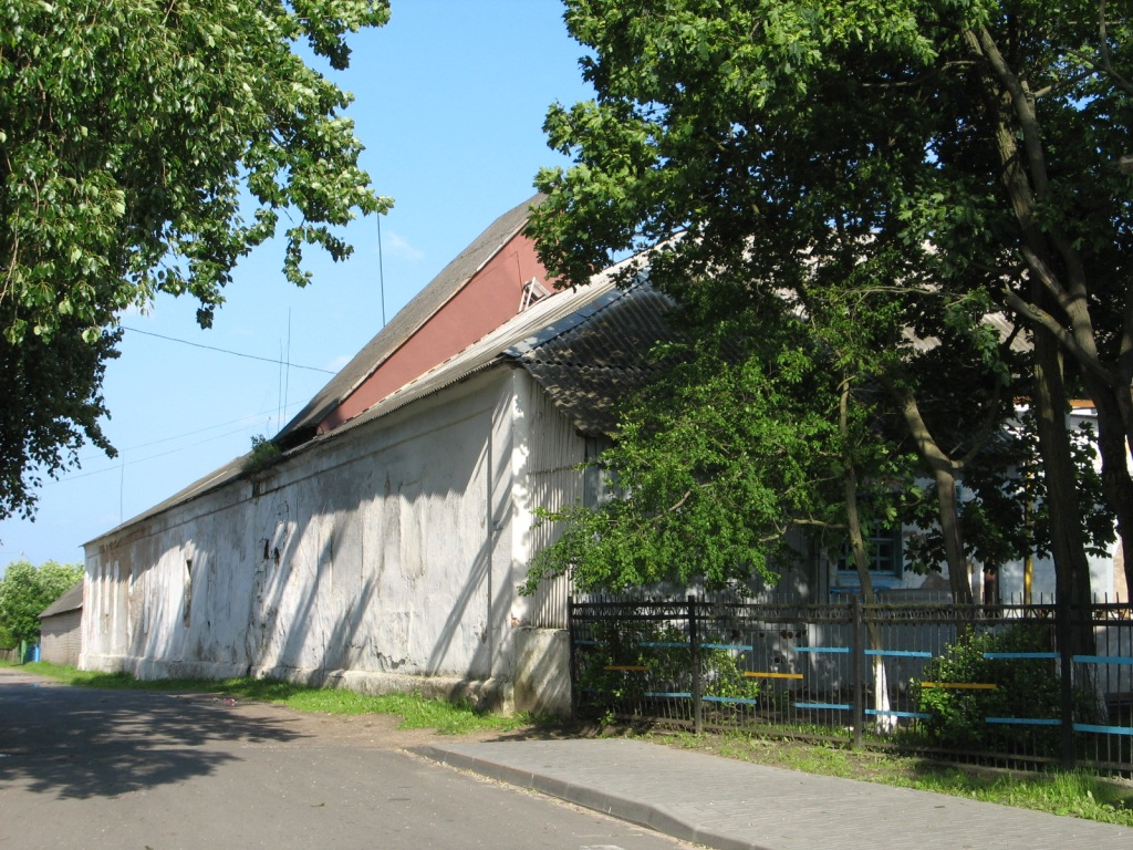 Bernardine monastery (Slutsk, Belarus)